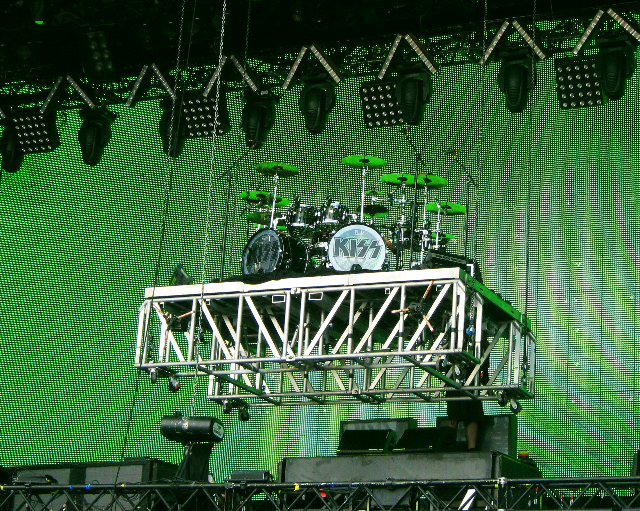 Eric Singer - Montage podium batterie - Hellfest 2010